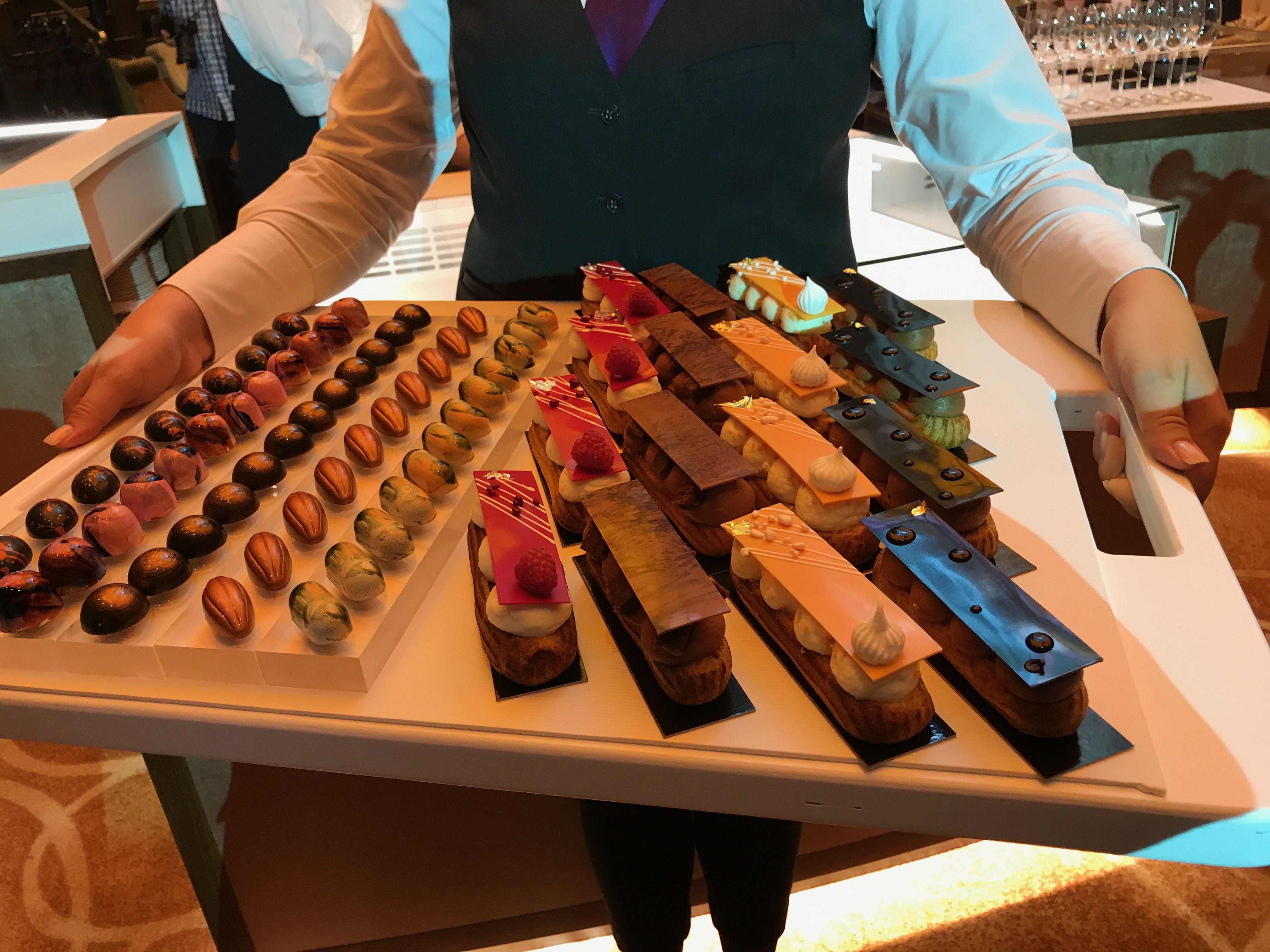 Auswahl an Patisserie (Ian Baker)